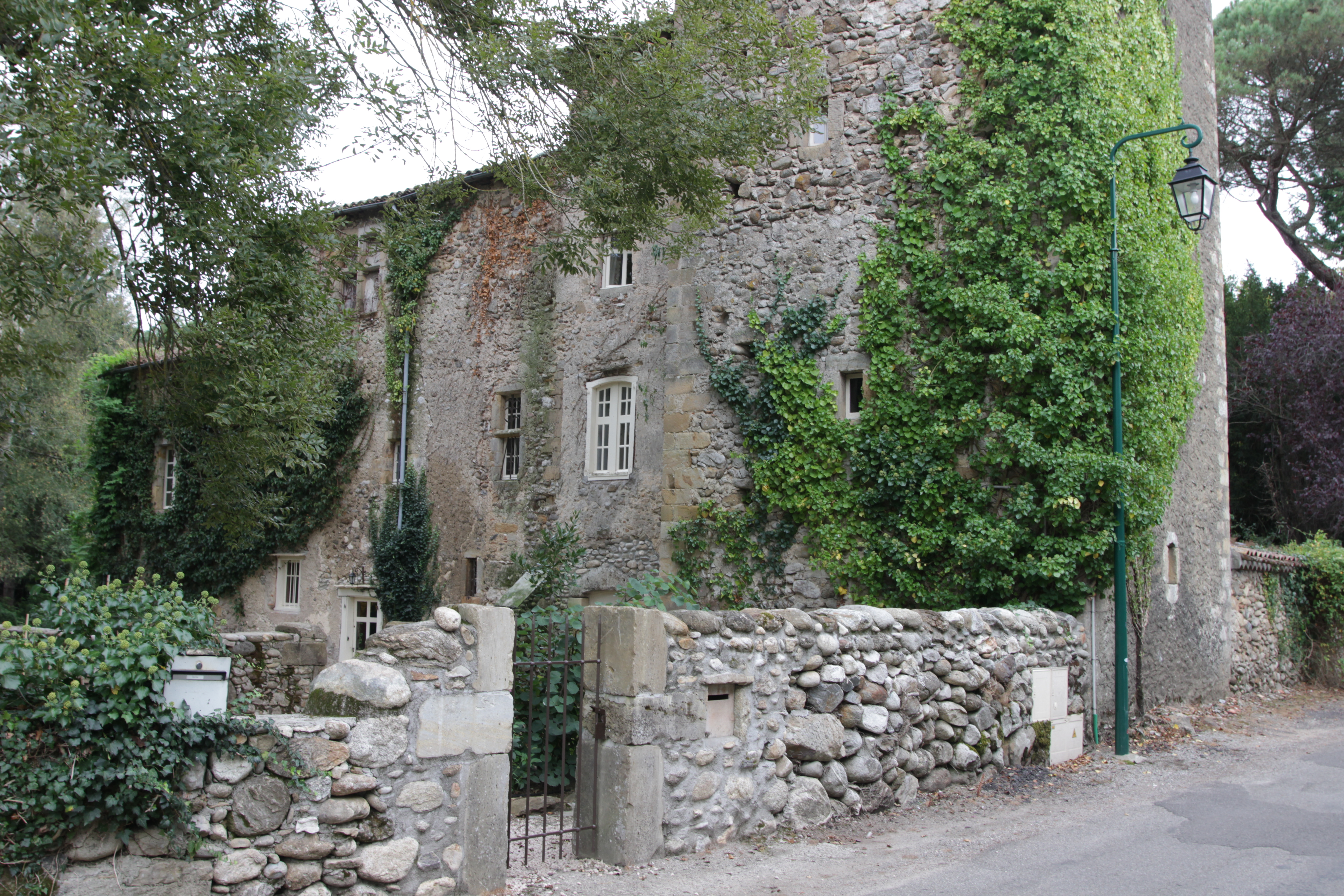 Château de Loubières